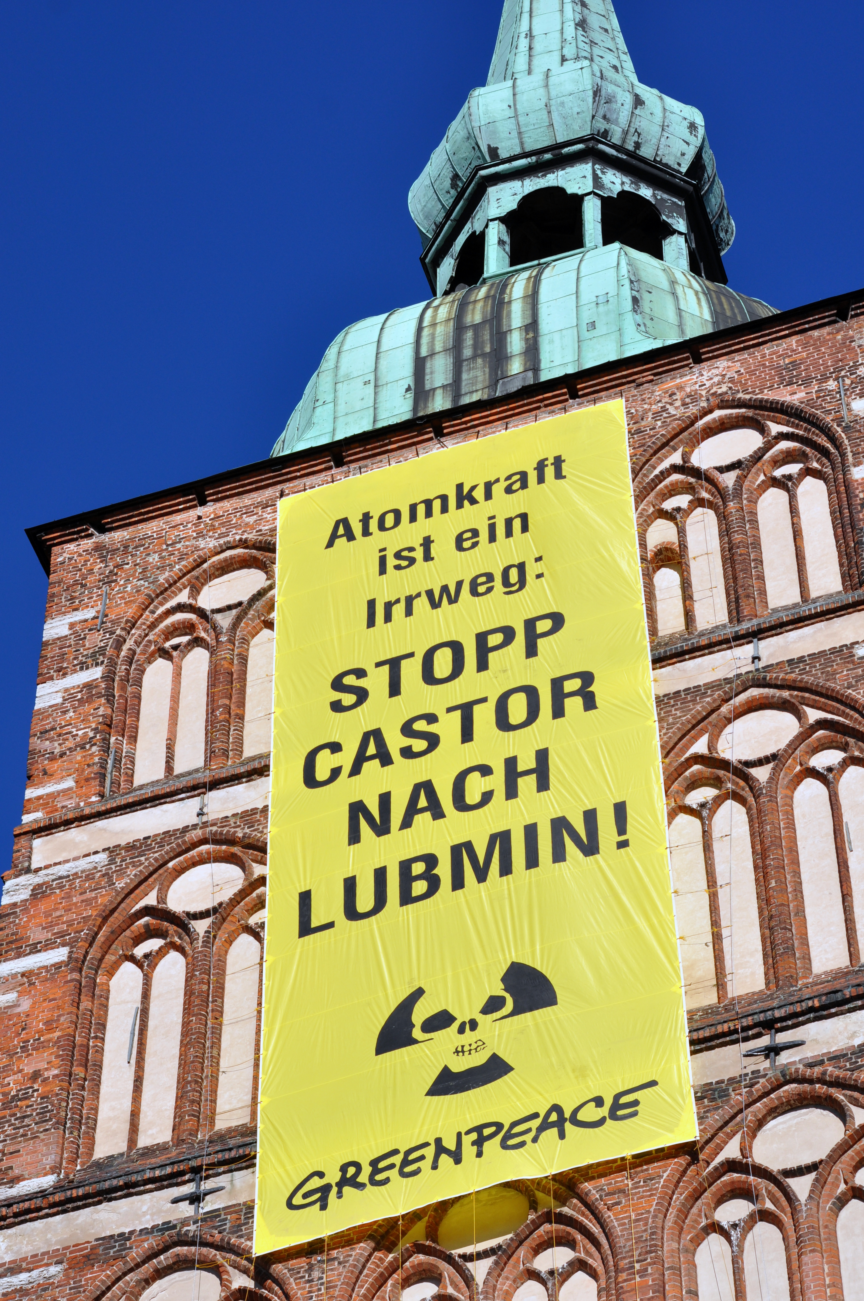 Banner der Organisation Greenpeace im Februar 2011 am Turm der St.-Nikolai-Kirche (Stralsund). Text: "Atomkraft ist ein Irrweg: Stopp Castor nach Lubmin! Greenpeace"